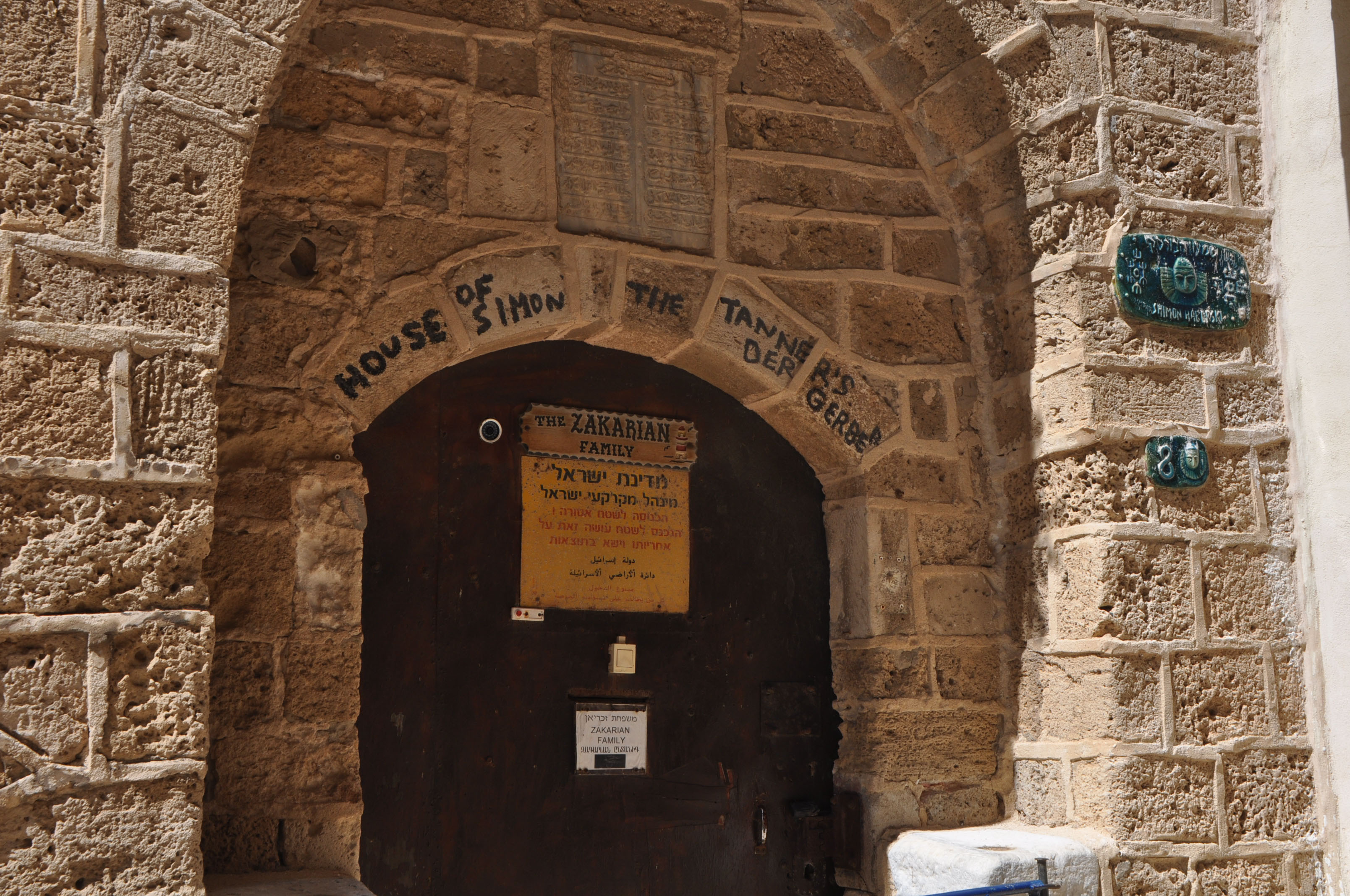 Jaffa's Old City - Simon the Tanner's House 2